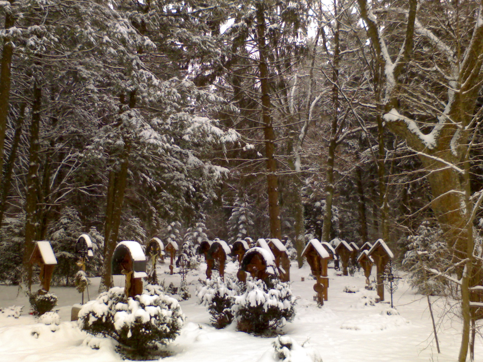 Waldfriedhof in München